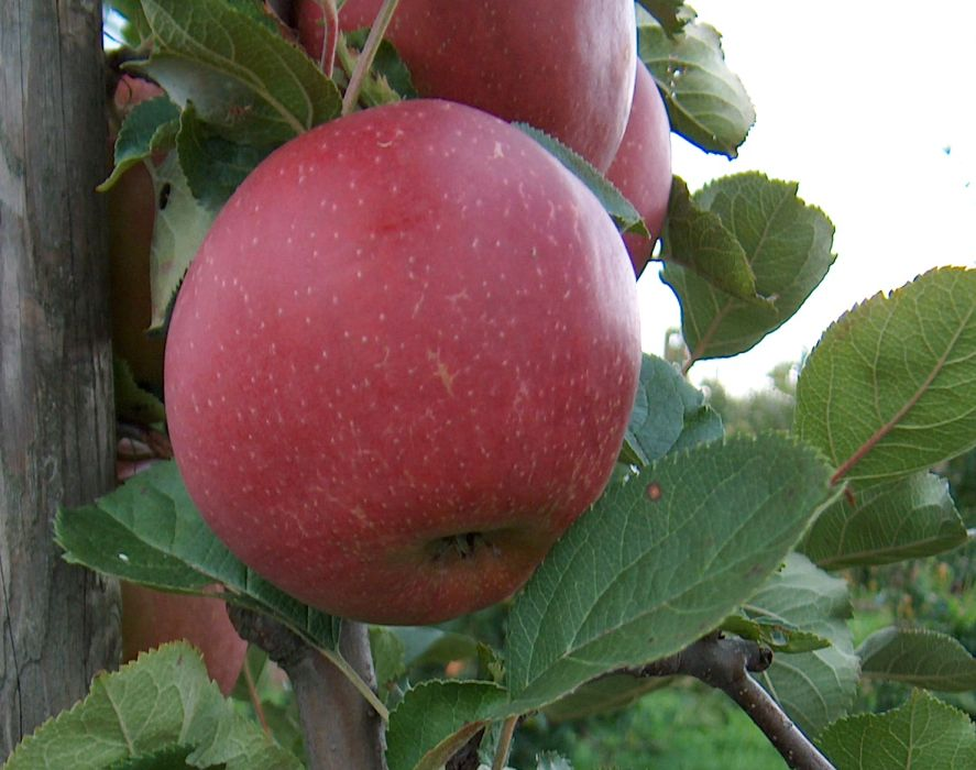 Roter Boskoop am Baum